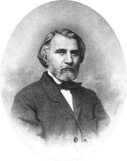 И.С. Тургенев. С фотографии Деньера. Конец 1850-х годов